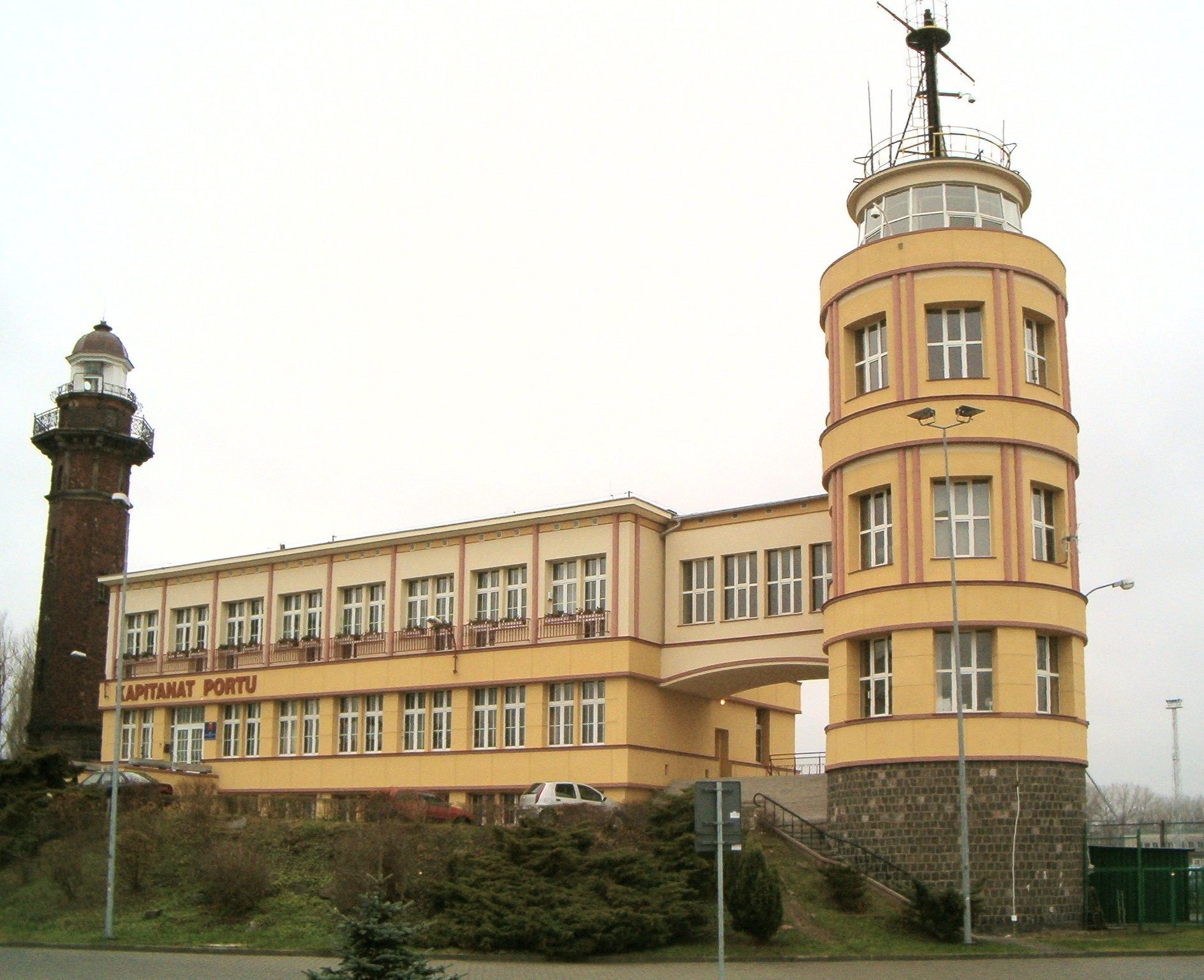 Budynek Kapitanatu Portu w Gdańsku. W tle zabytkowa latarnia morska.